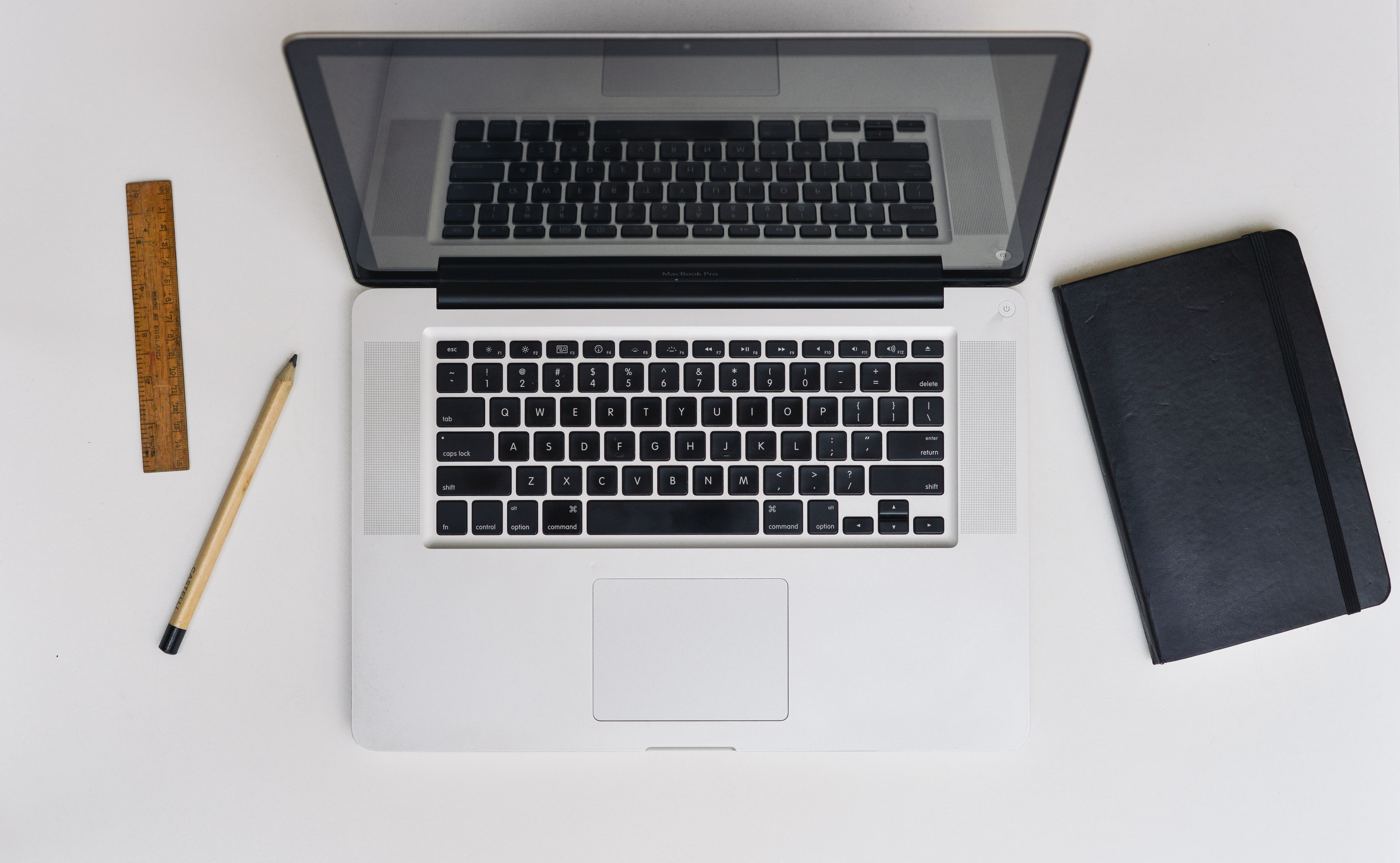 apple-desk-laptop-macbook-pro